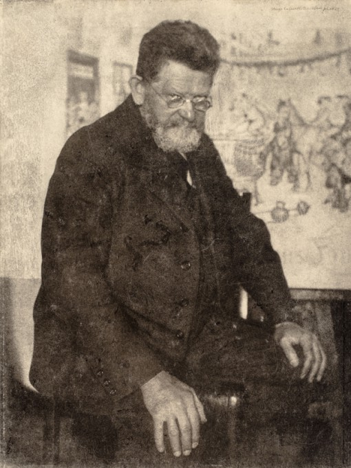 Portrait Heinrich Zille von Hugo Erfurth, Dresden. 1922, Bromöldruck, 29,2 x 21,9 cm